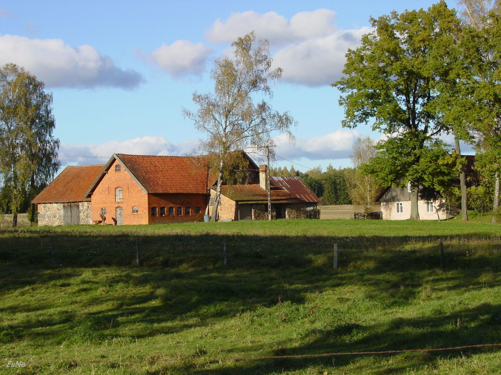 Prynowo - typowa zabudowa z czerwonej cegły i kamienia.